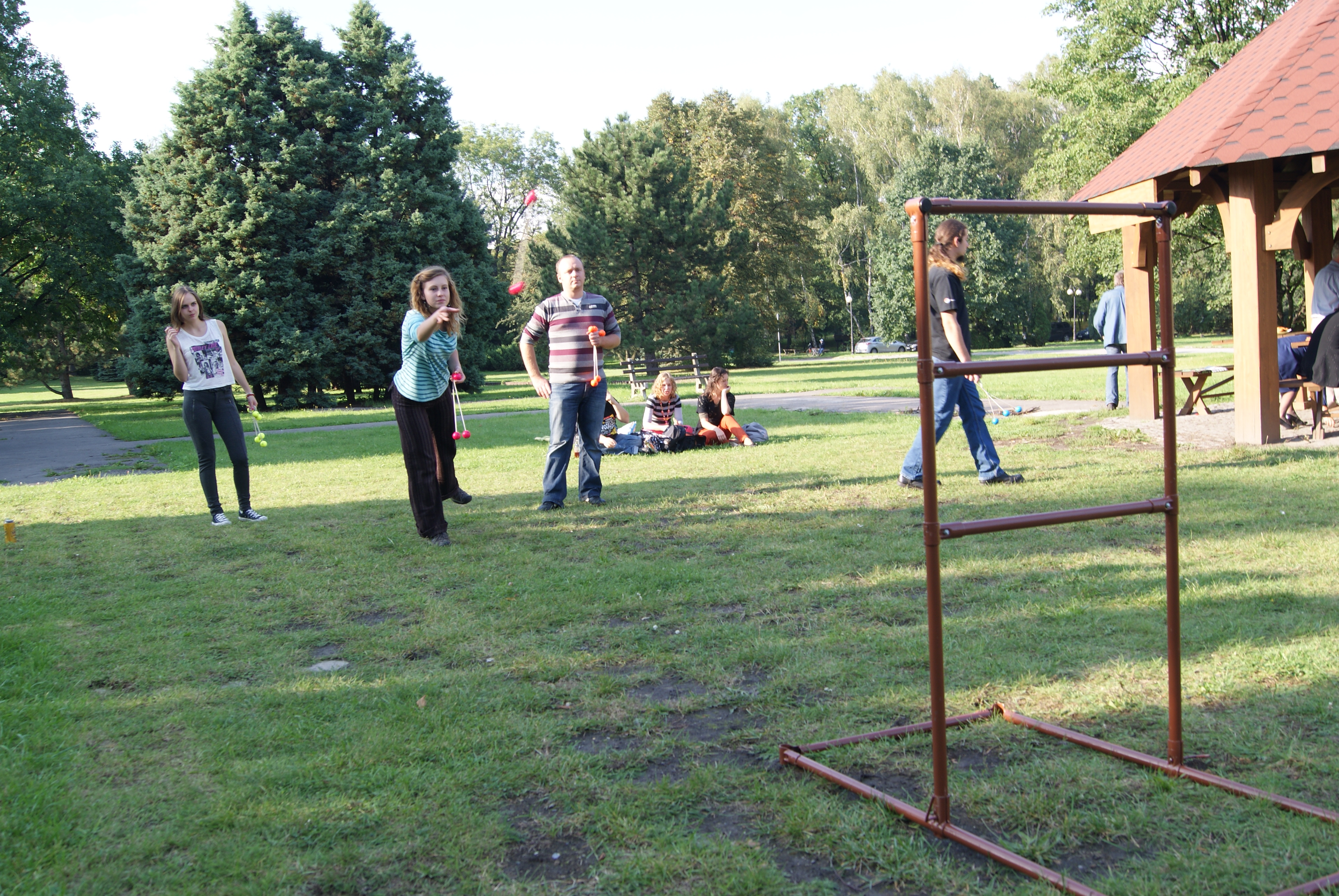 Pati rzuca bolami